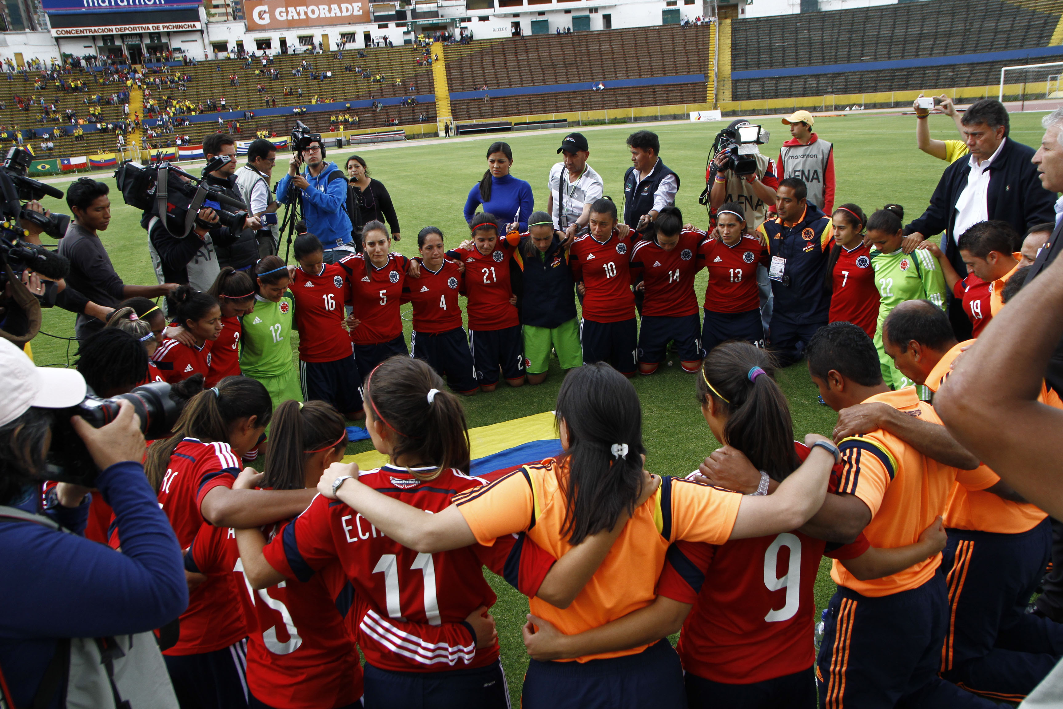 Quito, 28 sep (Andes).- La selección brasileña femenina de fútbol se proclamó Campeona de la Copa América de Fútbol Ecuador 2014. En la gráfica la selección de Colombia. Foto: Micaela Ayala V./Andes